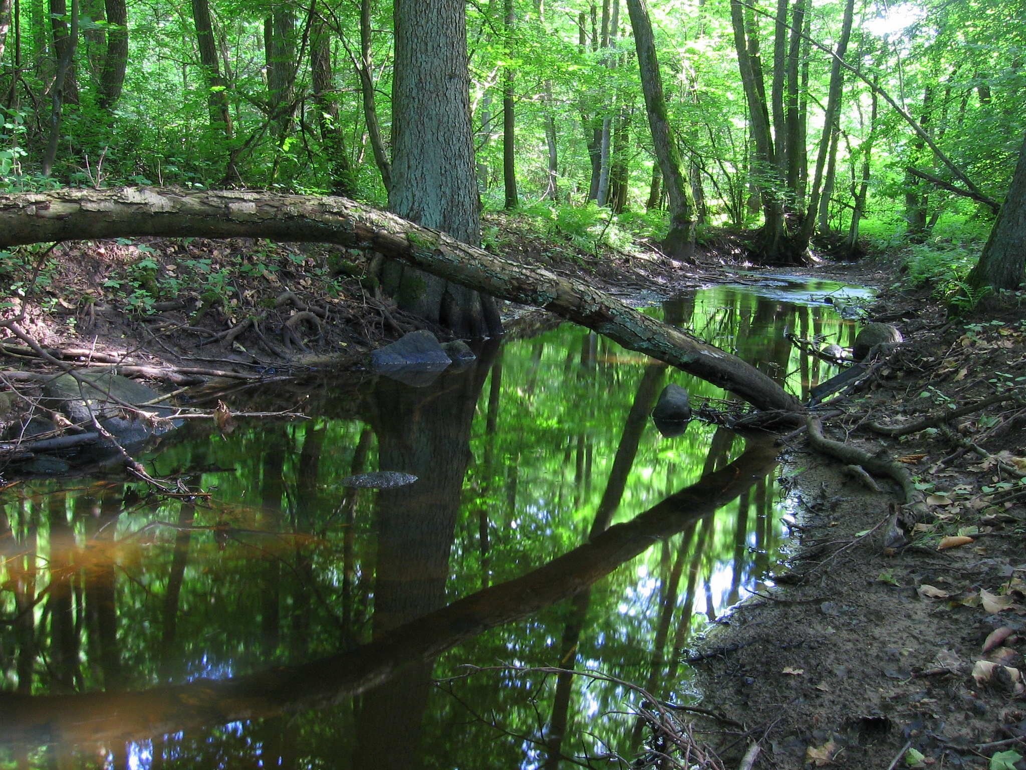 Rega na południe od drogi Rycerzewko-Kapice